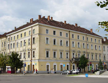 Casa Pataki-Teleki din Cluj-Napoca - A Pataki-Teleki-ház